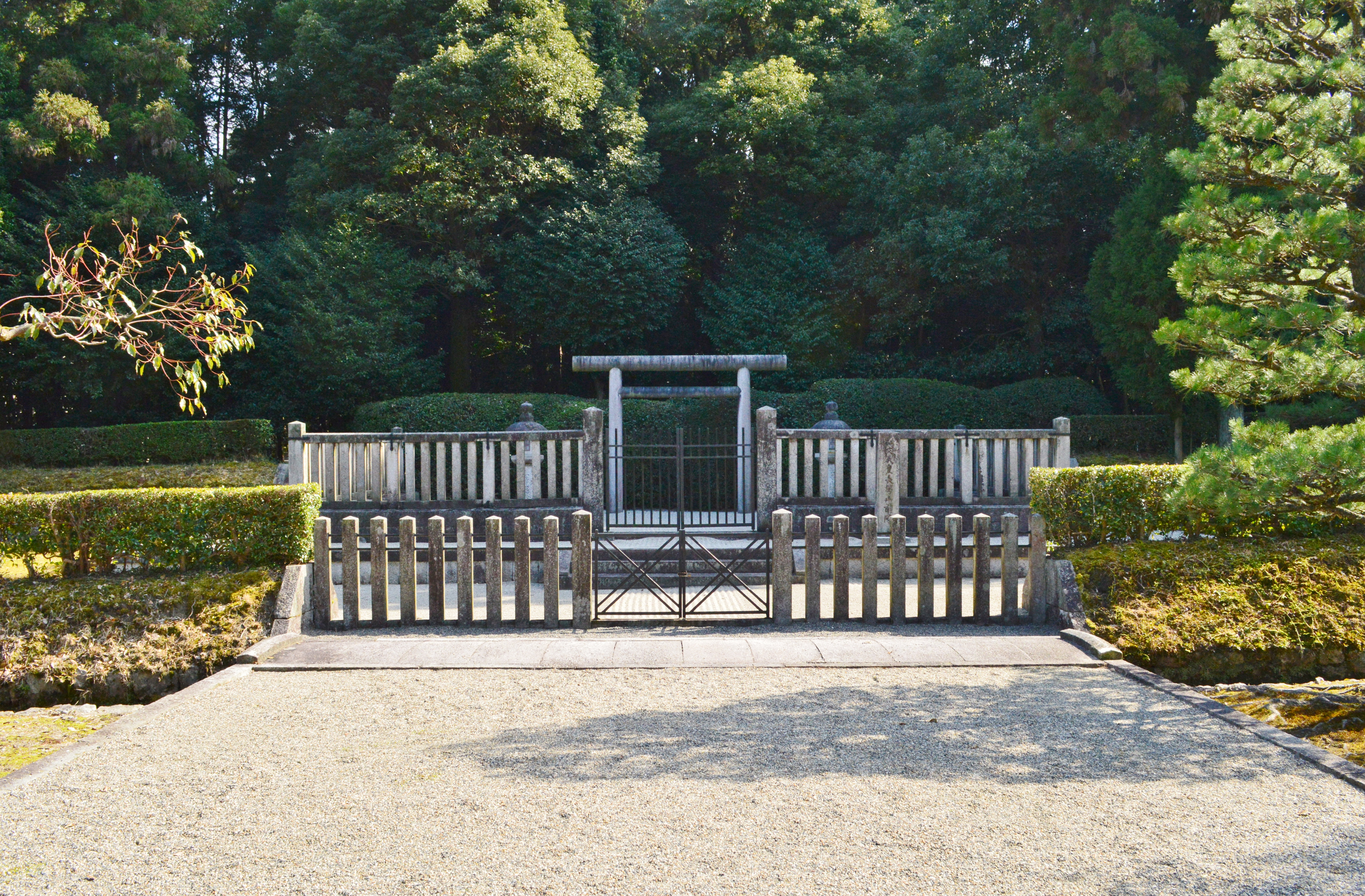 弘文天皇長等山前陵 拝所